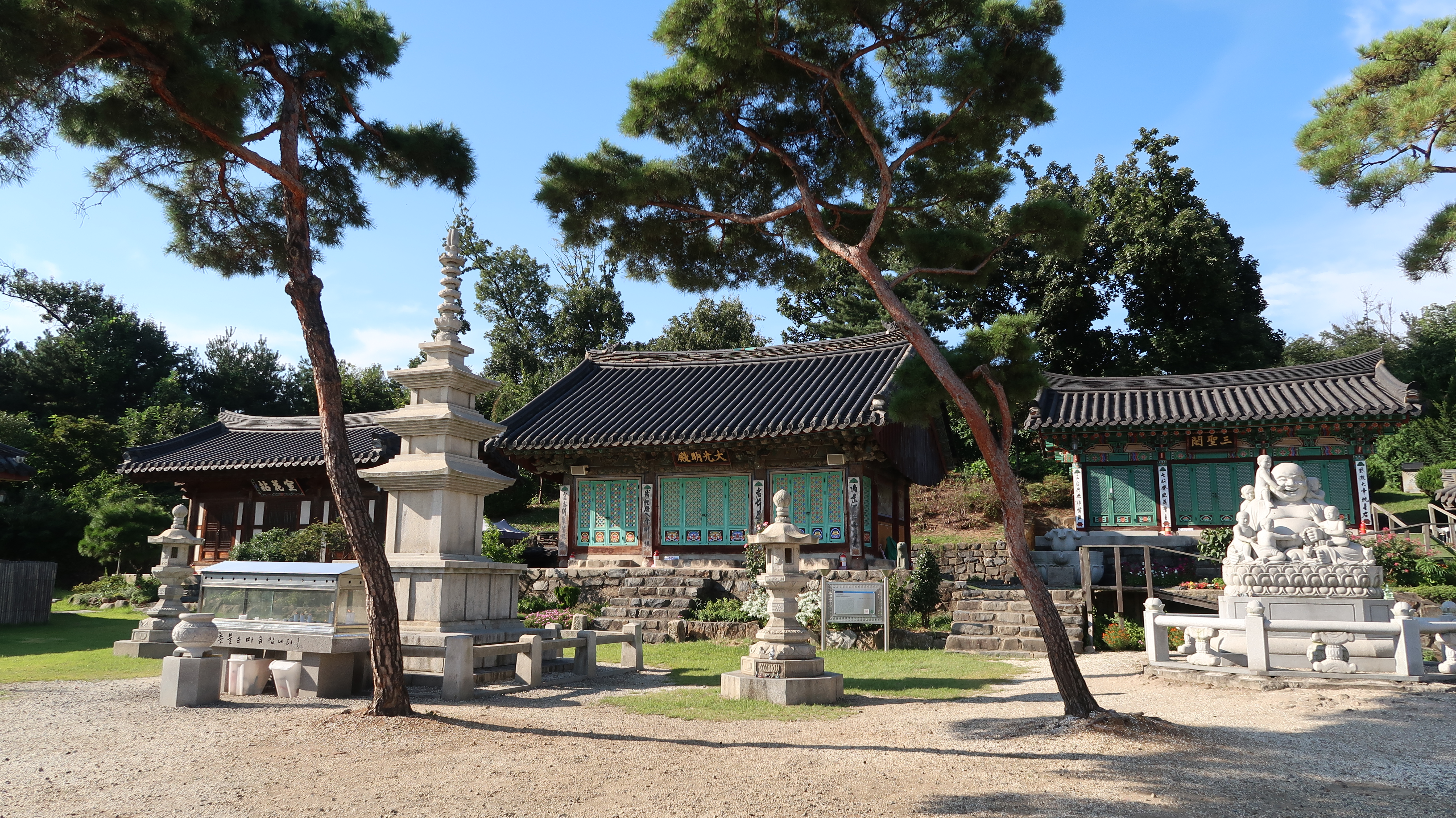 봉국사대광명전 (경기 성남시 수정구 태평동 216-2)